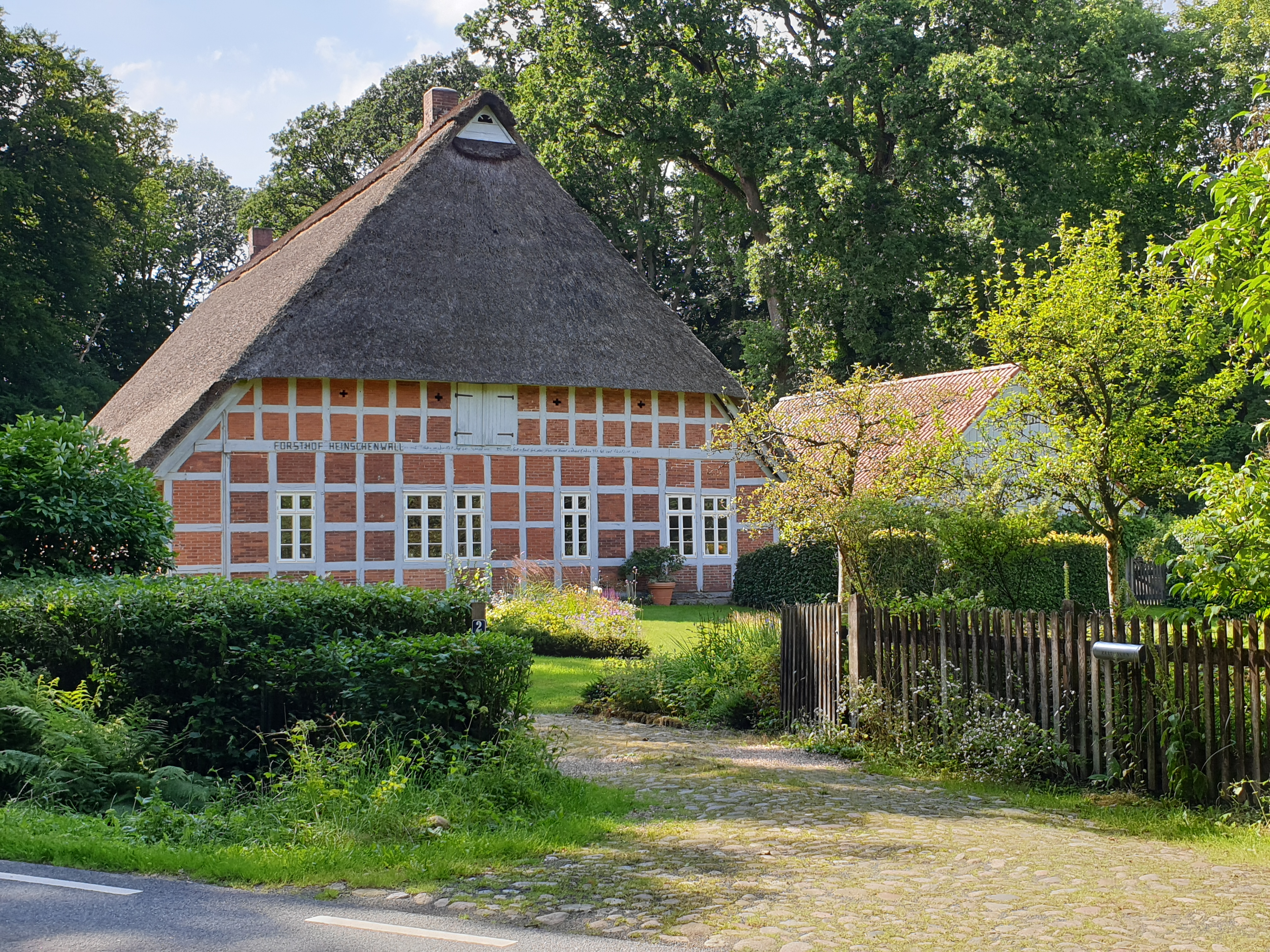 Der Hof Heinschenwall bildete etwa ab 1850 mit fünf weiteren Höfen die Gemeinde Einstellige Höfe, aus der die jetzige Ortschaft Heinschenwalde hervorging. Der Hof liegt heute auf dem Gebiet der Gemeinde Hipstedt nahe der Geeste und eines Wallrings kurz vor dem Bahnhof Heinschenwalde im Norden vom niedersächsischen Landkreis Rotenburg (Wümme).